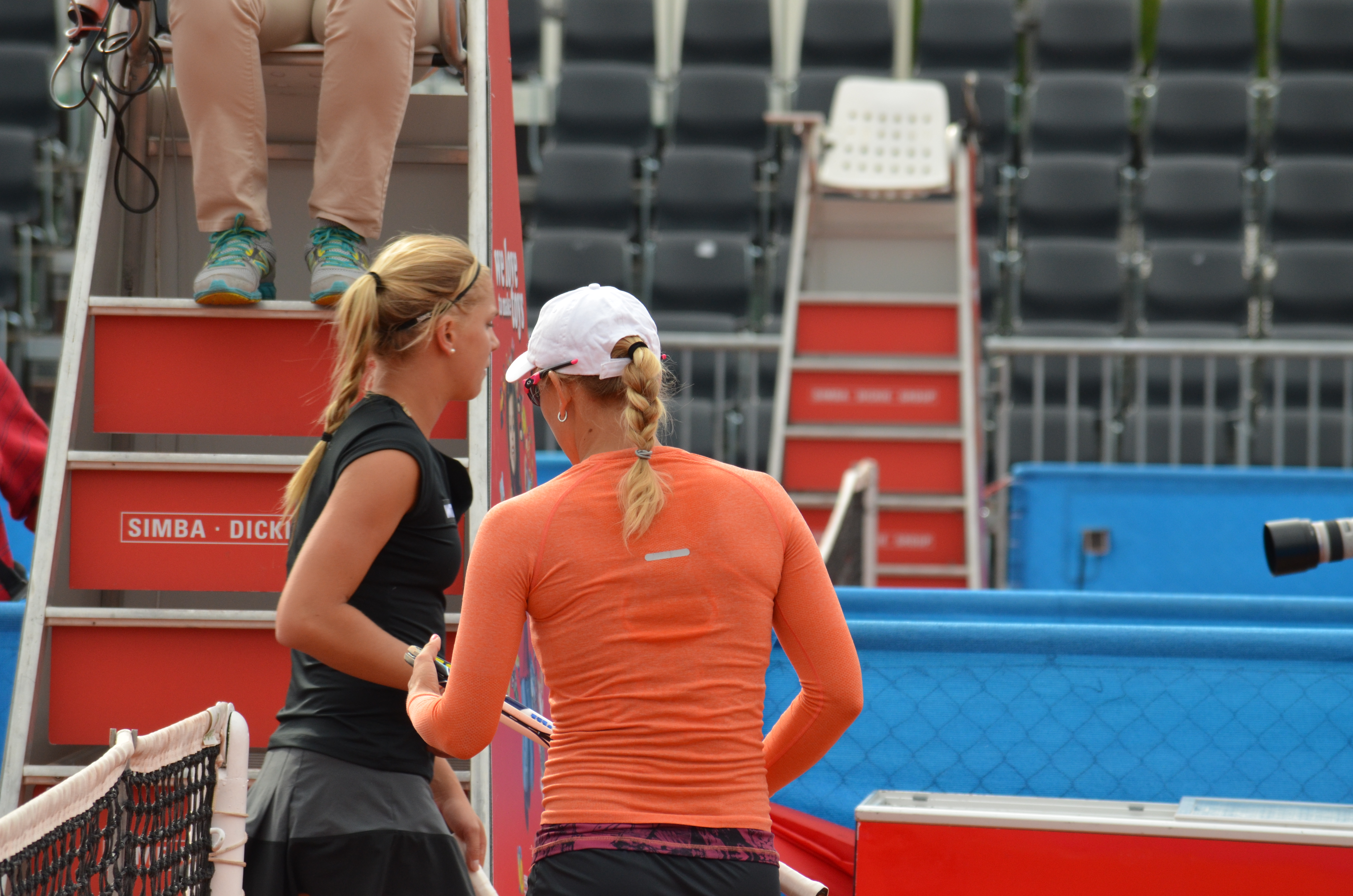 Anastasia Rodionova und Luisa-Marie Huber beim Seitenwechsel bei der Erstrundenbegegnung der Qualifikation beim Nürnberger Versicherungscup 2014